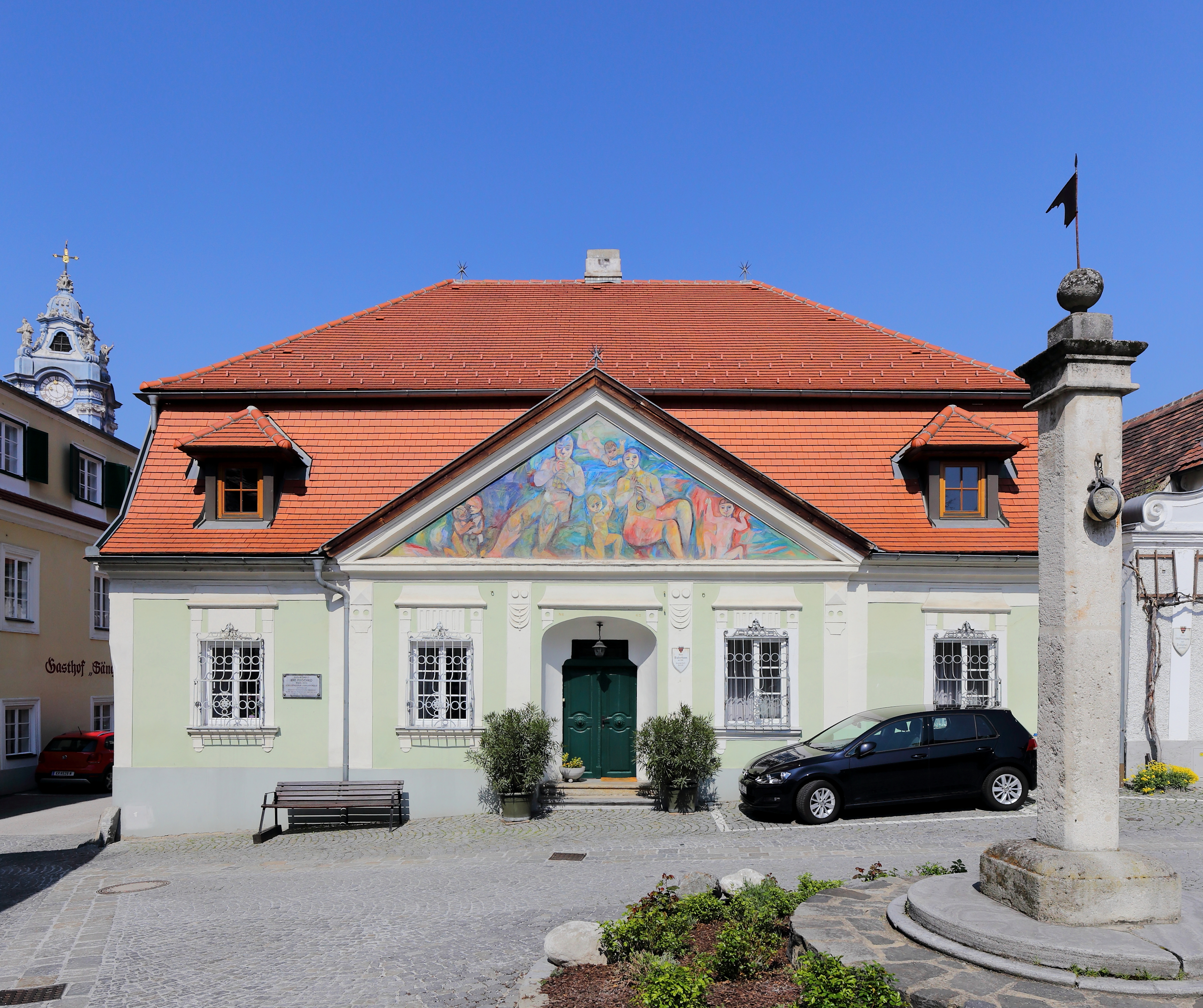 Das ehemalige Baderhaus in der niederösterreichischen Stadt Dürnstein.Das Gebäude hat einen Baukern von 1668 und eine klassizistische Fassade um 1800. Im Dreiecksgiebel befindet sich ein modernes Fresko von Maximilian Melcher, das er 1963 schuf und eine Musikantenfamilie darstellt.